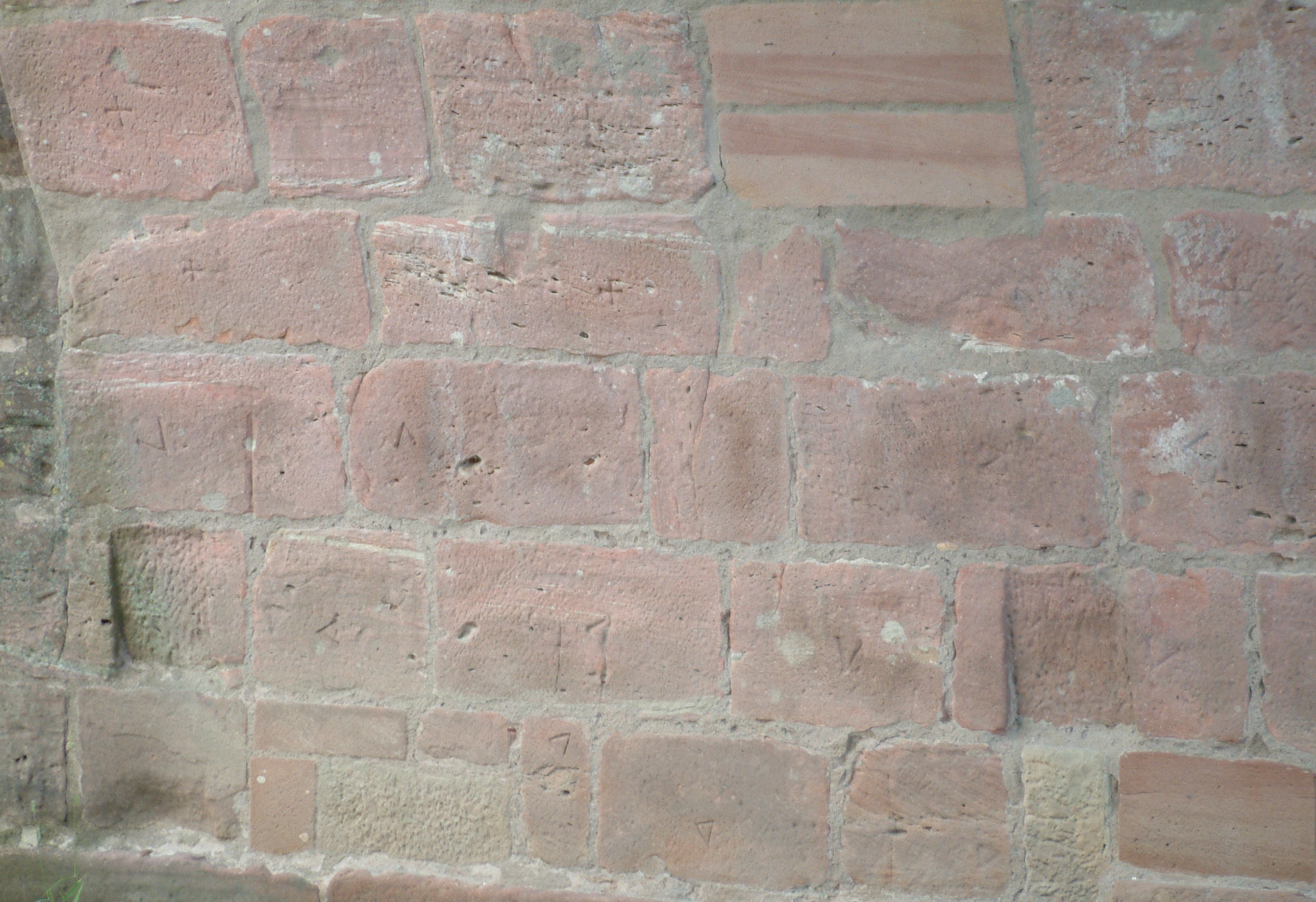 Ansicht des sechsten Bogens (von Süden) der Werrabrücke Vacha mit Steinmetzzeichen